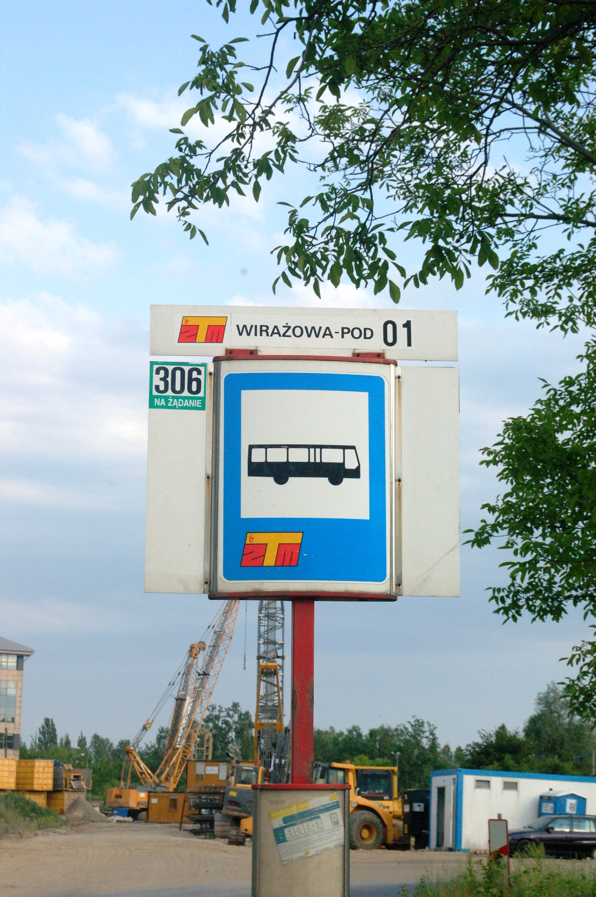 Fort VII ("Zbarż"), Warschau